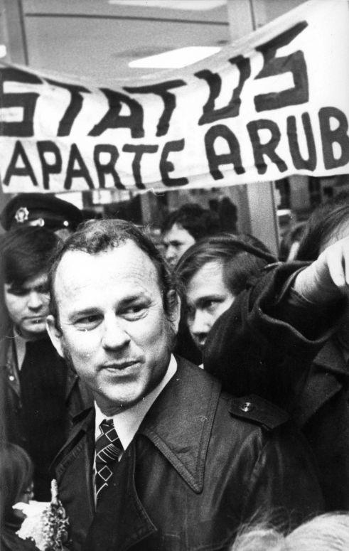 Aruba Onafhankelijkheid. Vanmorgen arriveerde een Arubaanse delegatie met de ex-minister Croes, die een onafhankelijk voorstaat, Schiphol, Nederland 31 januari 1976. Foto: Dhr Croes wordt verwelkomd door aanhangers met spandoeken.